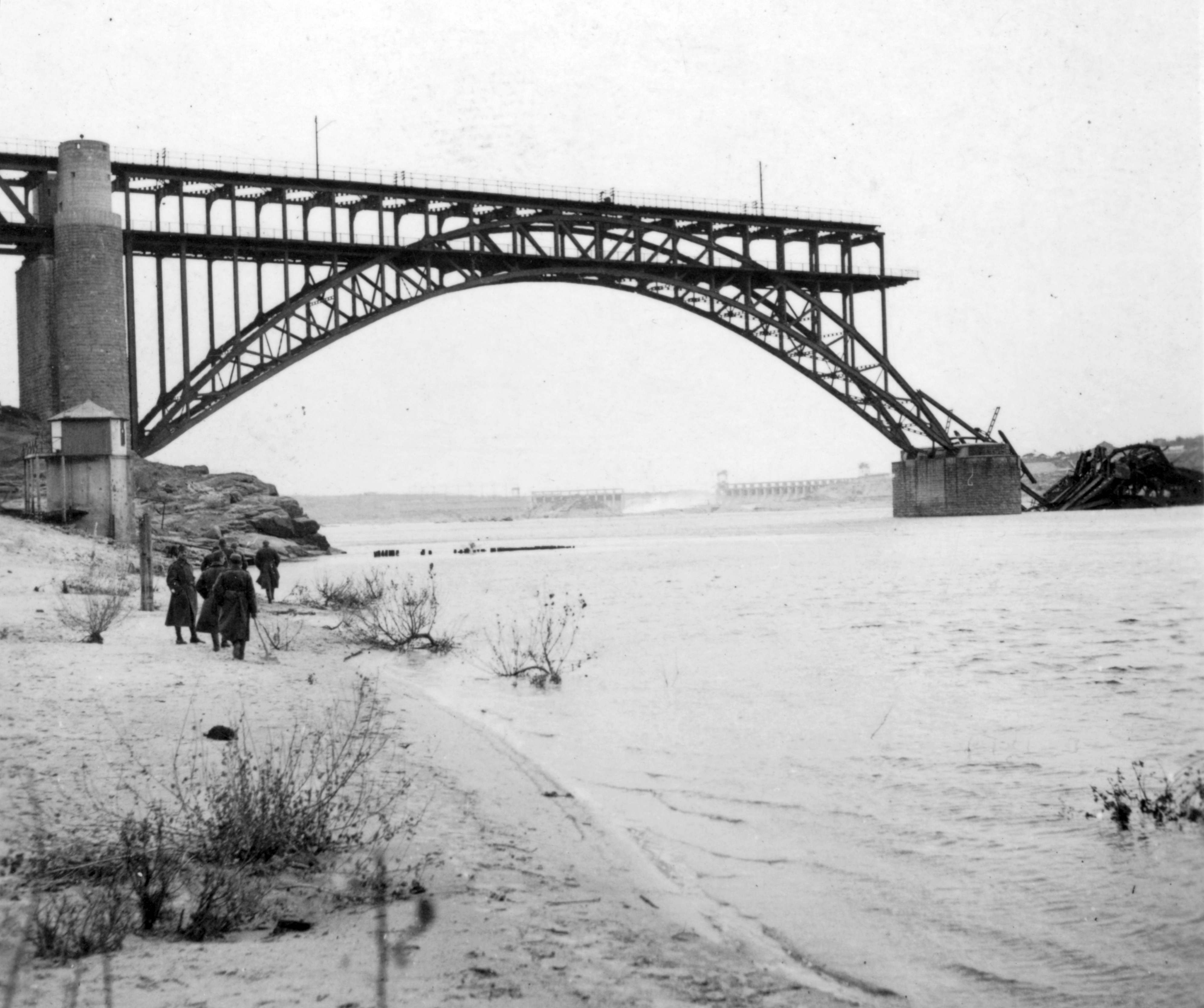 felrobbantott kétszintes vasúti és közúti híd a Dnyeper folyón, háttérben az ugyancsak felrobbantott vízerőmű (1941. augusztus). Location: Ukraine, Zaporizhia Tags: wrecked bridge, railway, bridge, railway bridge, river, dam Title: felrobbantott kétszintes vasúti és közúti híd a Dnyeper folyón, háttérben az ugyancsak felrobbantott vízerőmű (1941. augusztus).